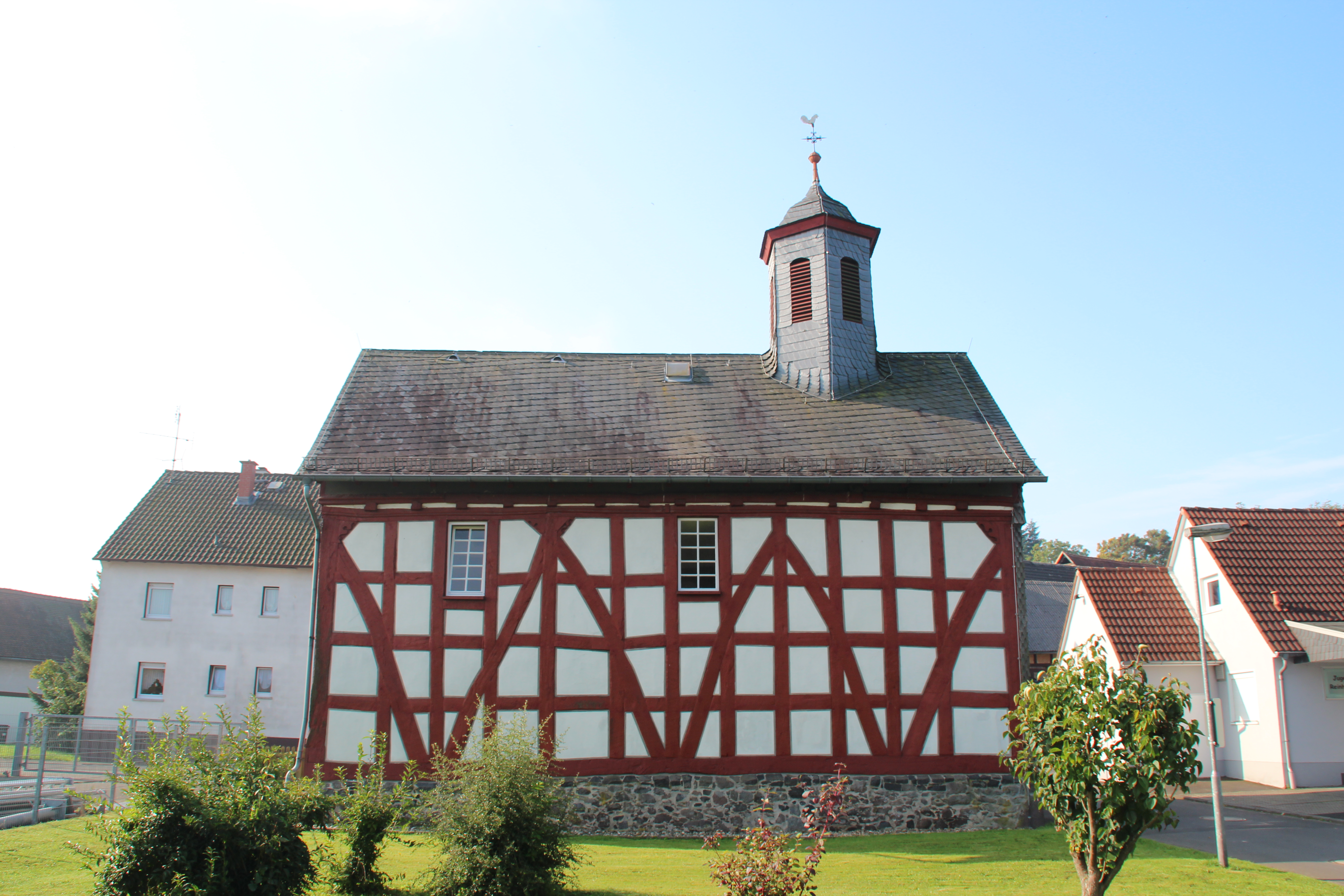 Evangelische Kirche Reinhardshain, Stadt Grünberg, Landkreis Gießen, Hessen, Deutschland